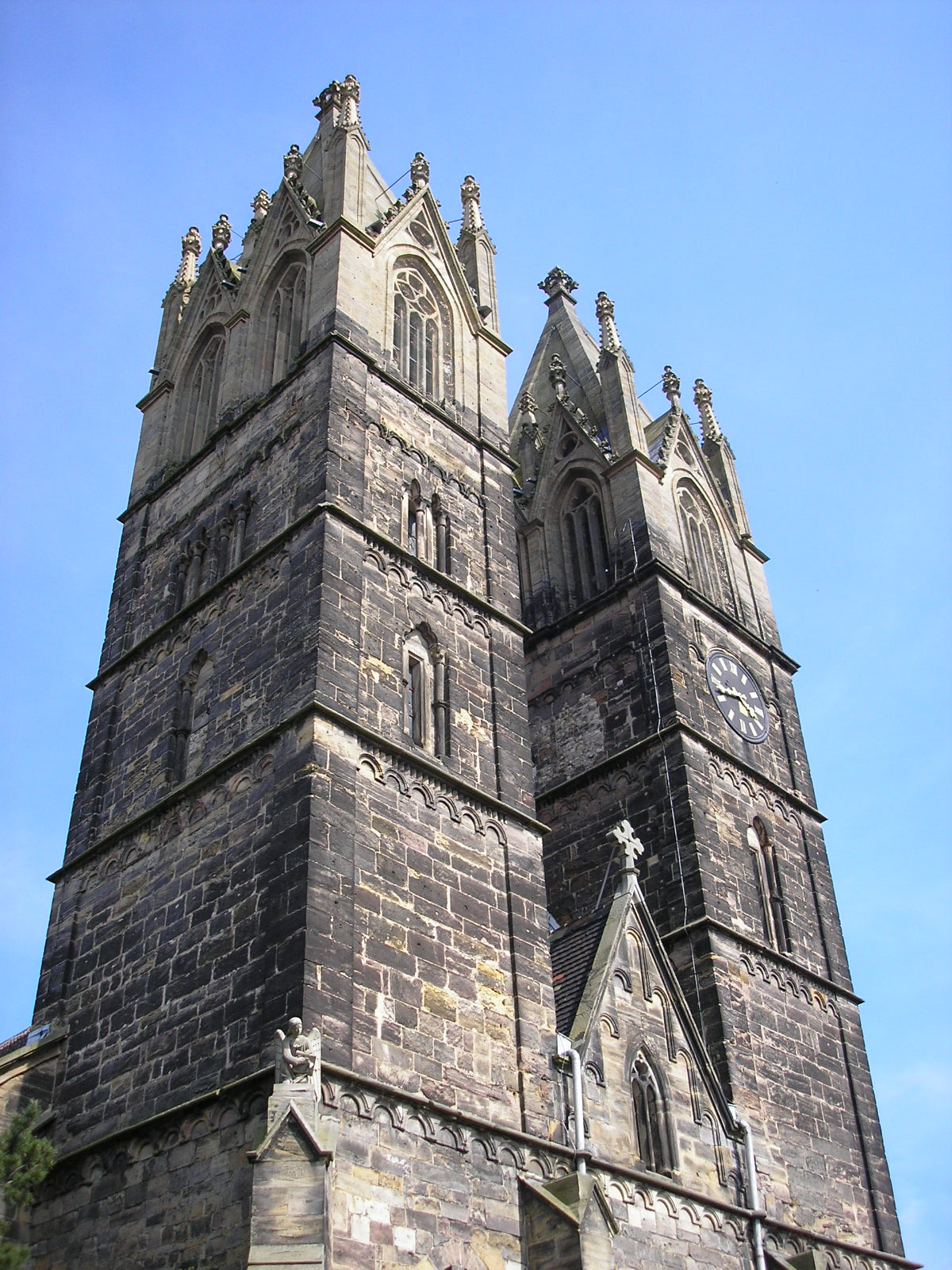 Das Westwerk der Stadtkirche von Stadtilm (Thüringen).